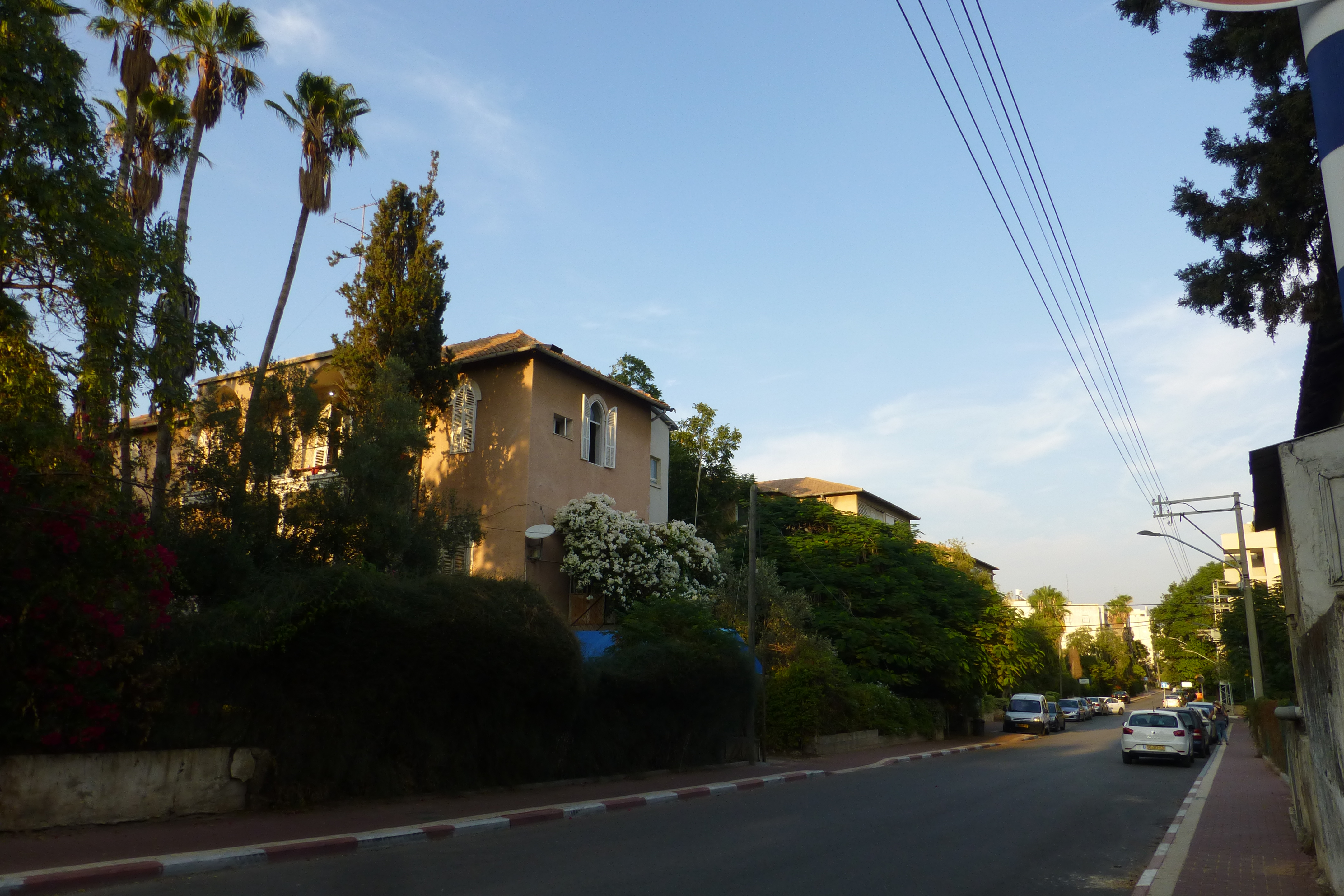 ברחוב מנוחה ונחלה התגוררו העשירים של אותם ימים ומשום כך הוא כונה רחוב המיליונרים. בתים לדוגמה: בית זקס - מס' 54, בית ברוידא - מס' 56.